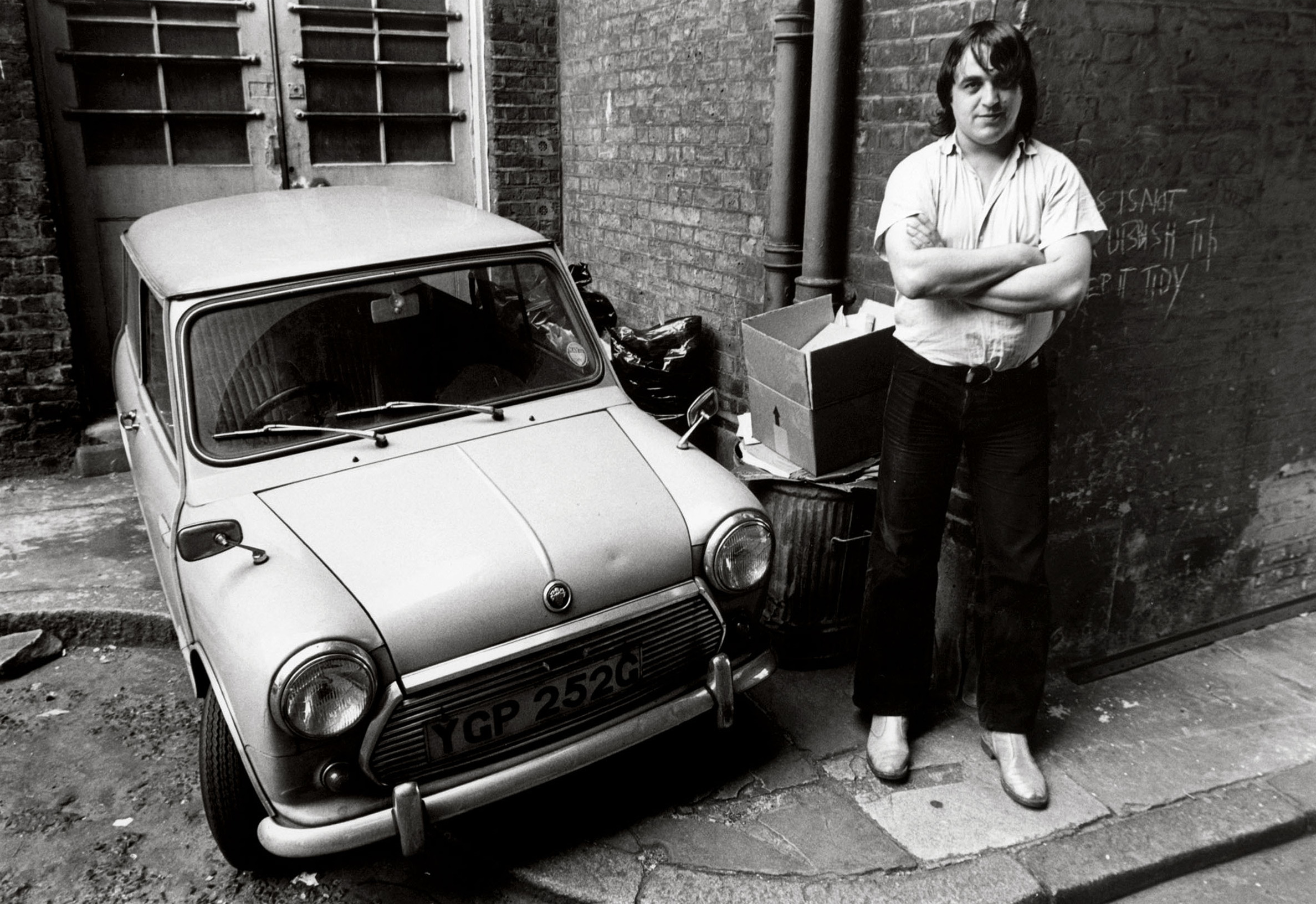 Marc Didden, Belgisch schrijver, journalist en filmmaker. Hier in Londen (GB) 1977.